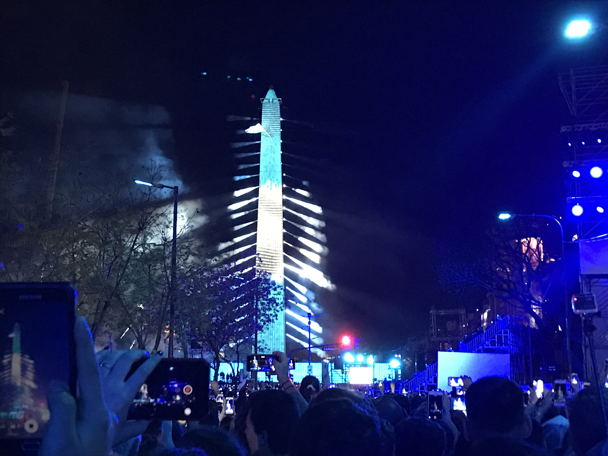 Le 6 octobre 2018, l’Obélisque est illuminé avec les couleurs de l’Argentine, lors de la cérémonie d’ouverture des Jeux. Pris depuis se trouvaient les spectacles à titre gratuit.